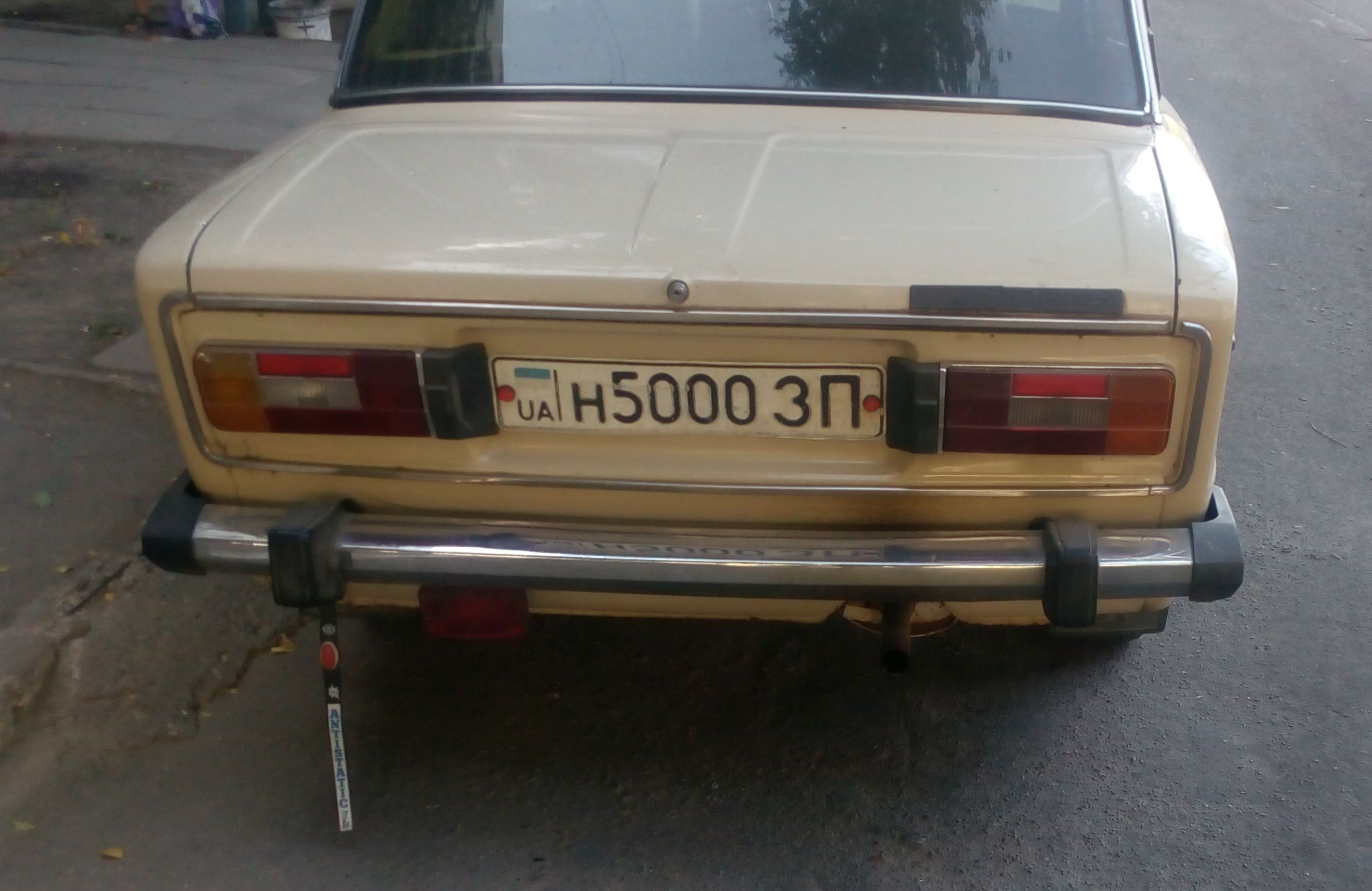 Рядянсько-український номер